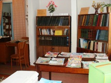 Публічна бібліотека с. Бережниця Дубровицького р-ну